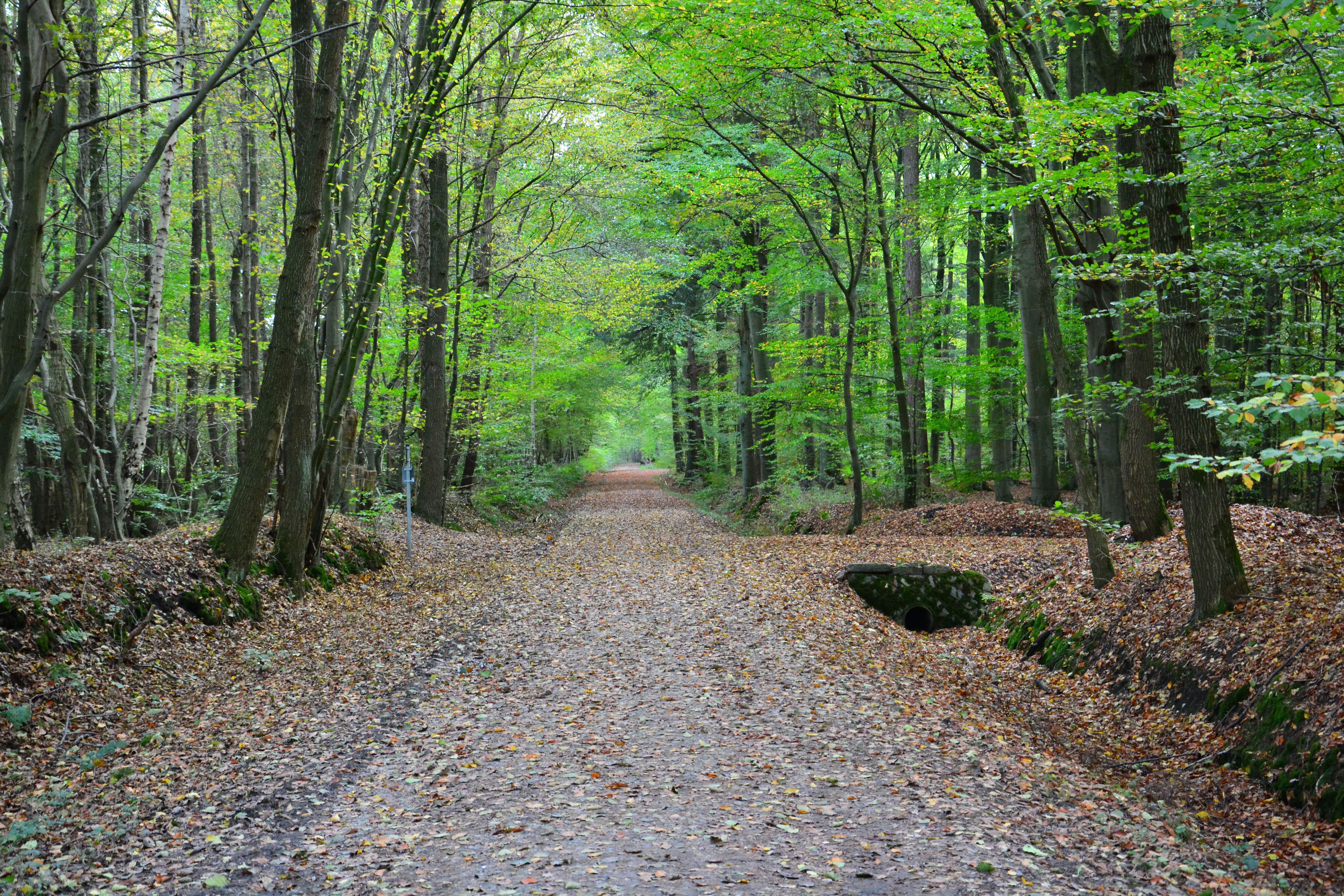 Waldweg im Klövensteen